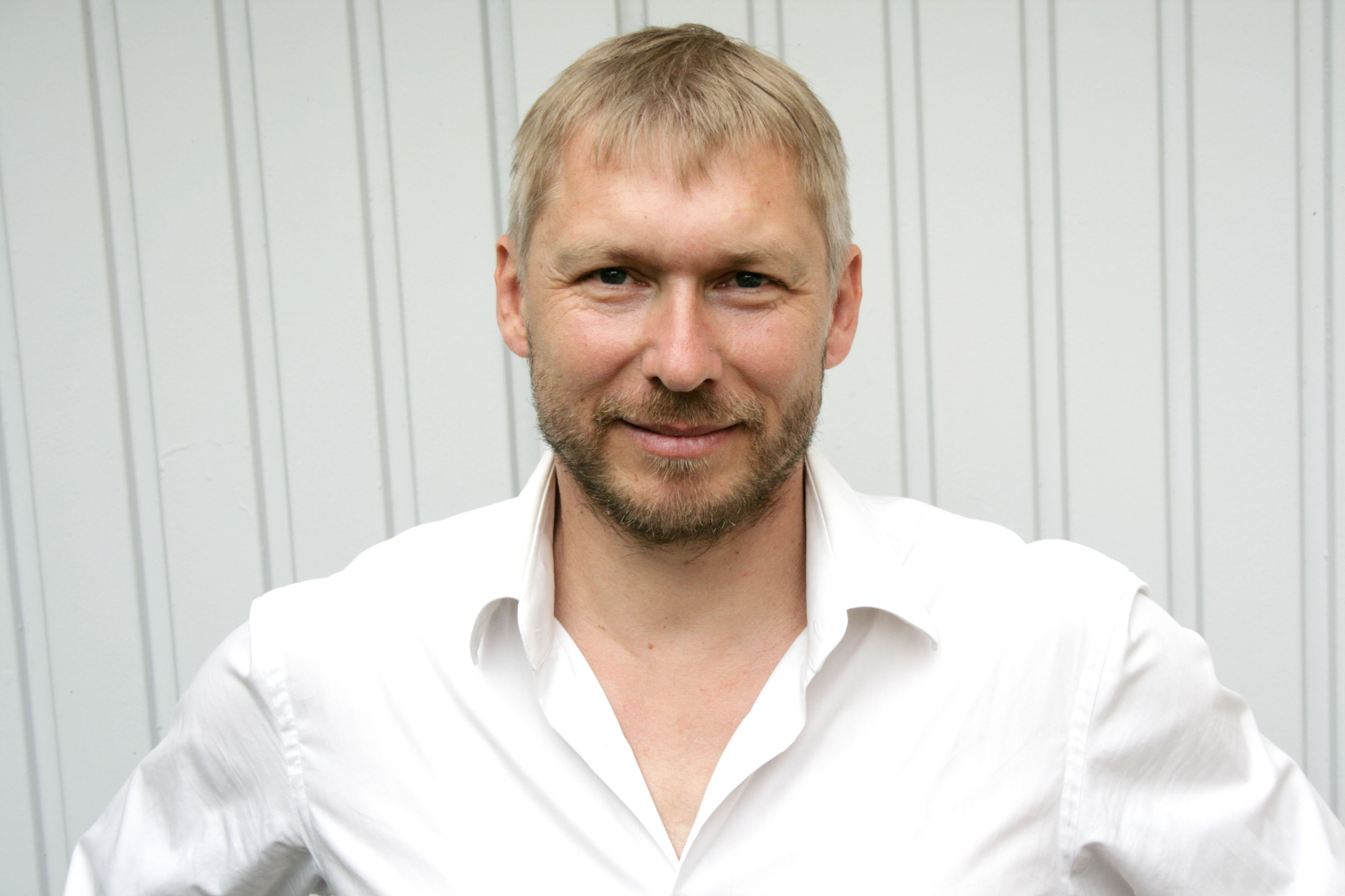 Portrait Andreas Huckele